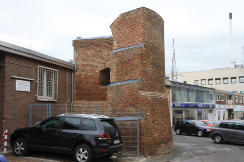 Rondell in der Schützenstr. in Düren